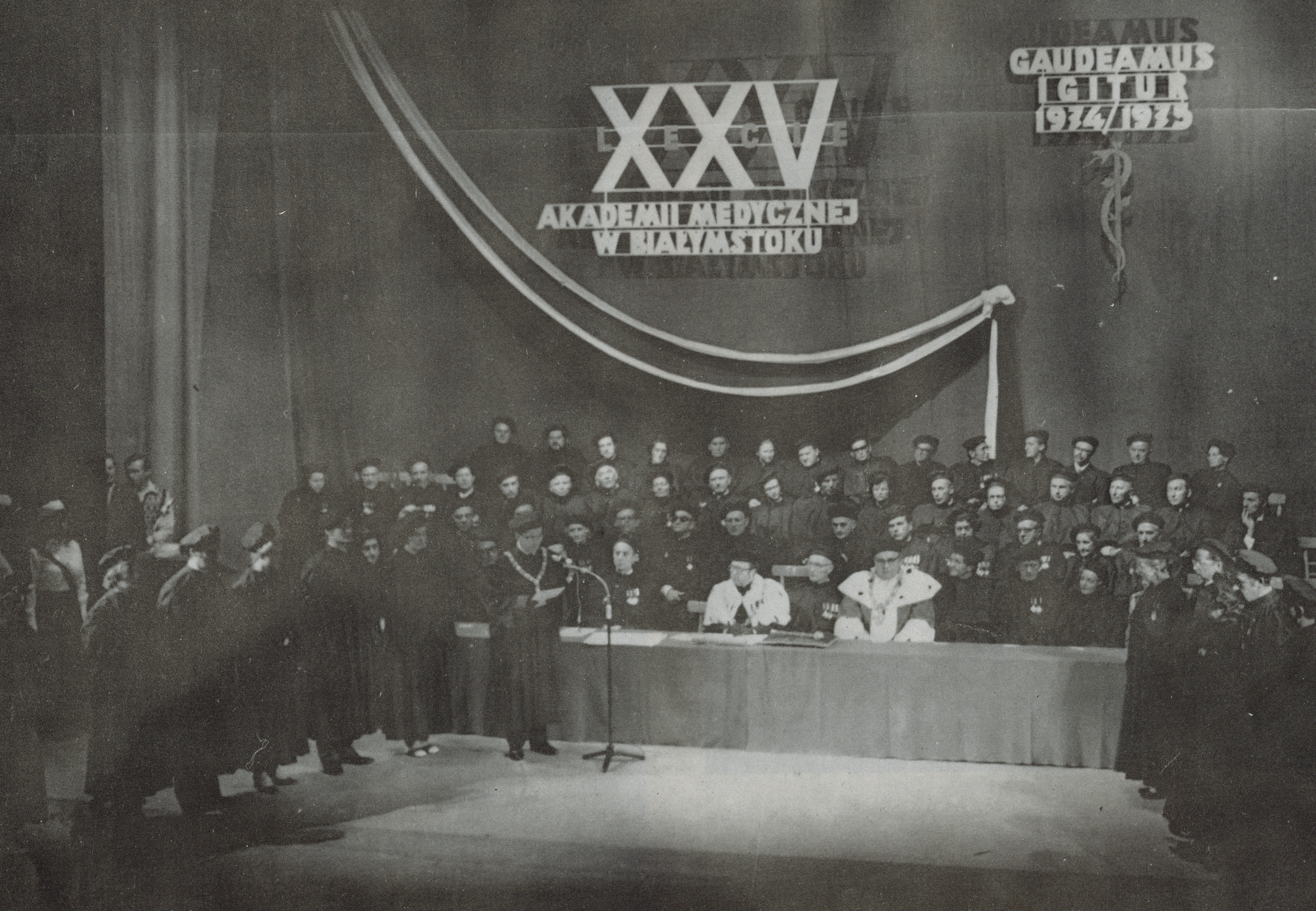 1975 25-lecie AMB